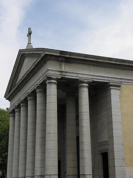 Portique hexastyle de l'église St-Pothin de Lyon